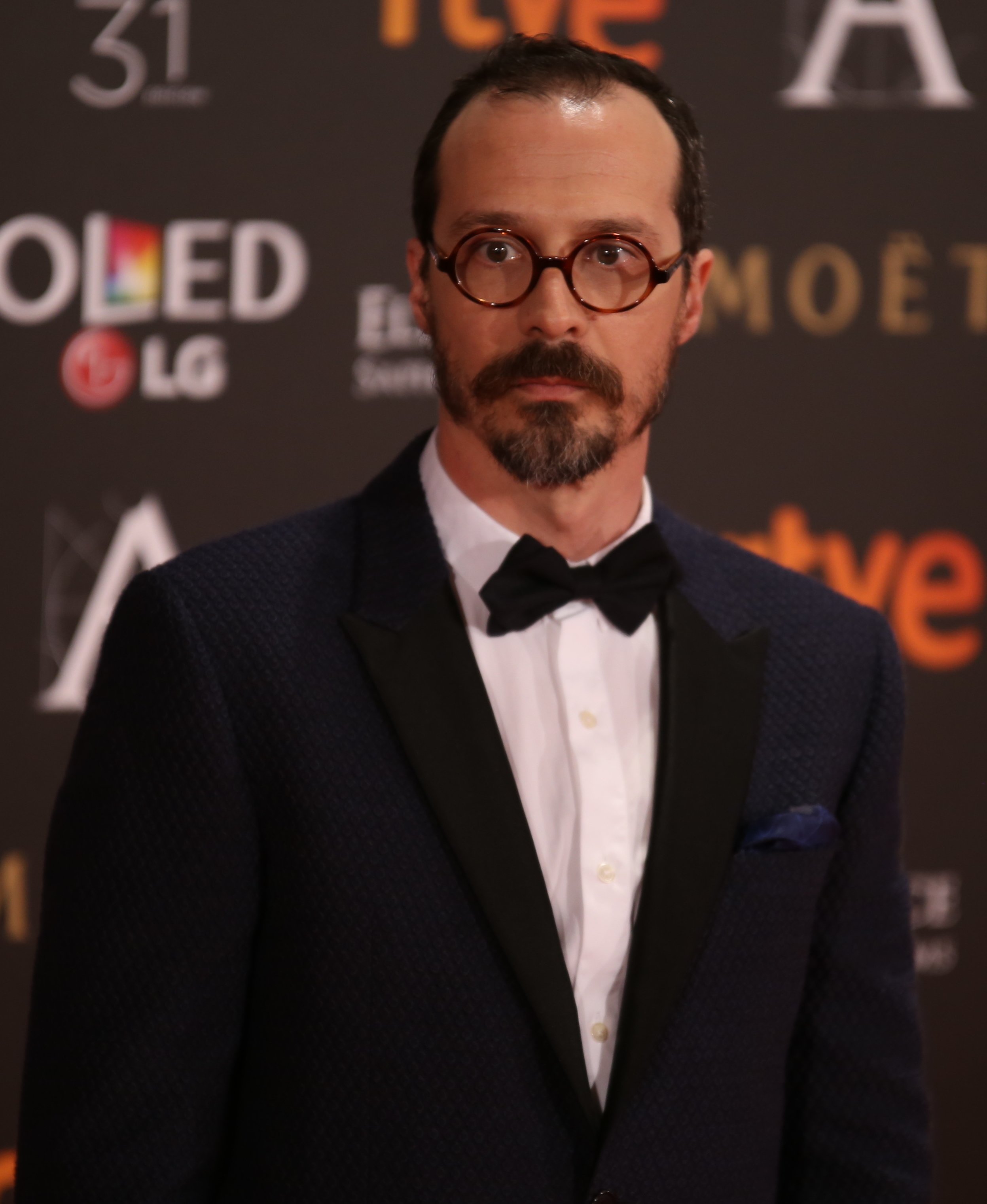 Premios Goya 2017